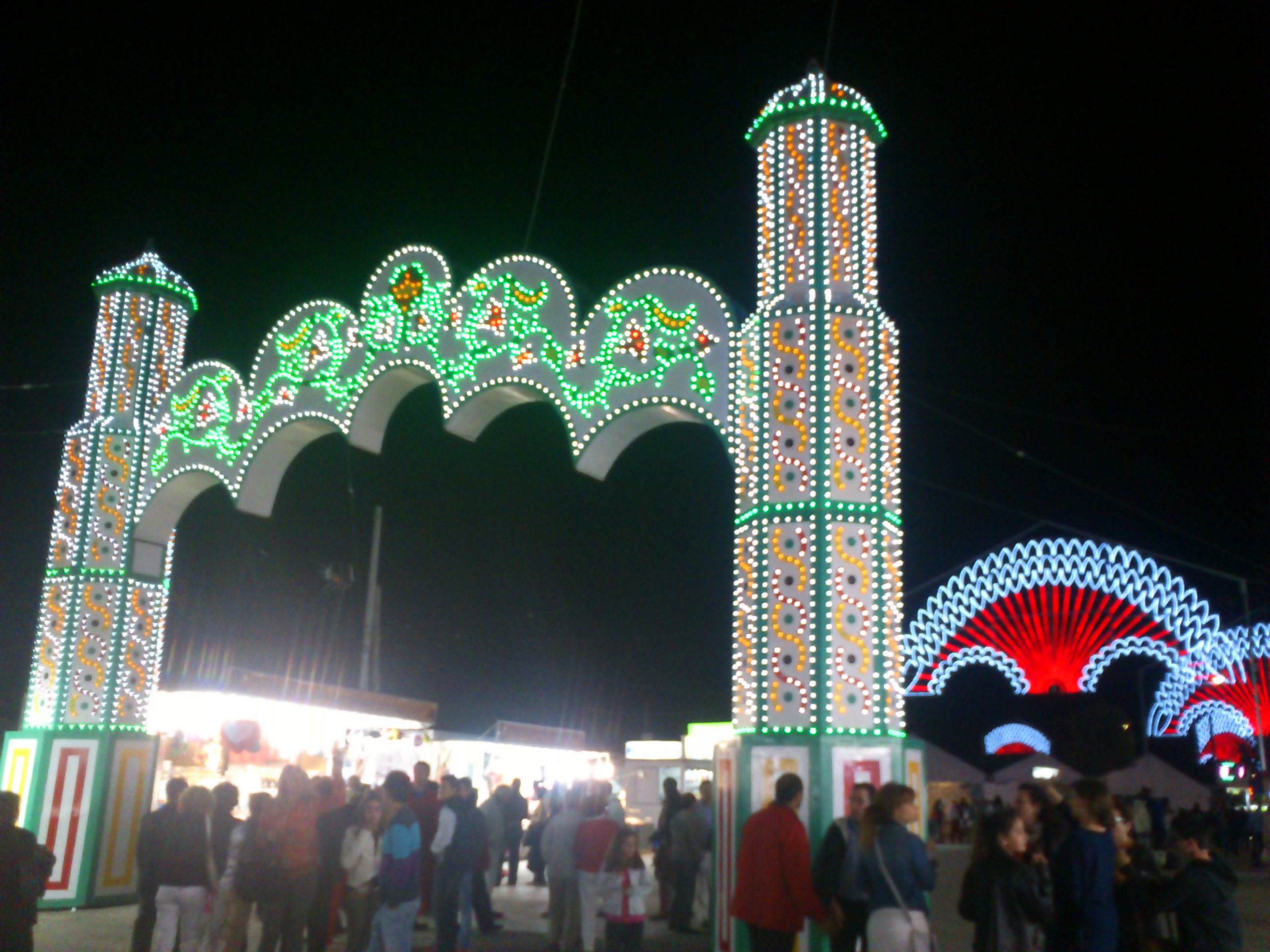 Portada de la feria - Úbeda (Jaén)